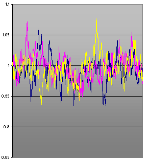 Pfade eines CIR-Prozesses.